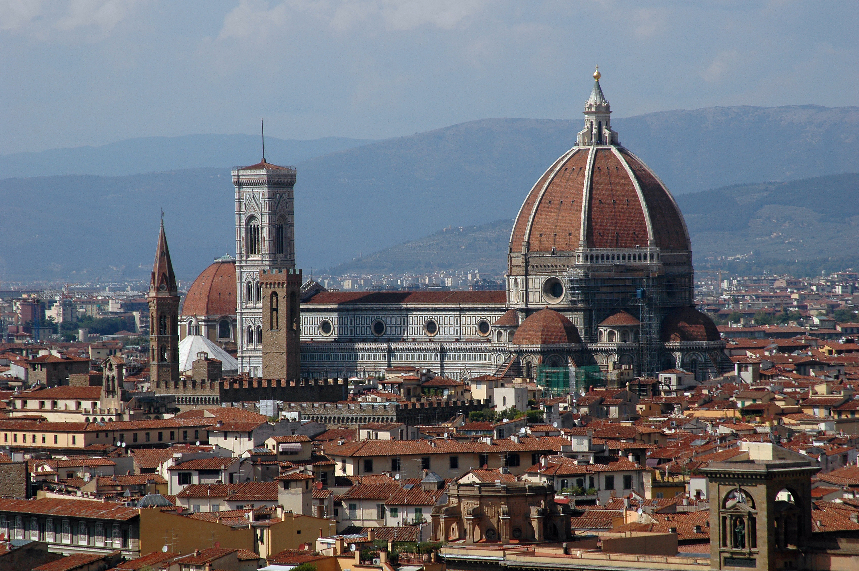 Santa Maria del Fiore